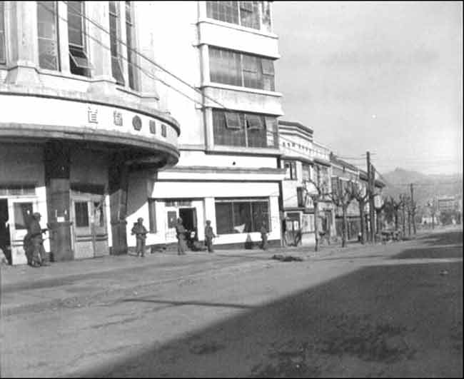 首都劇場、1951年3月16日の写真。